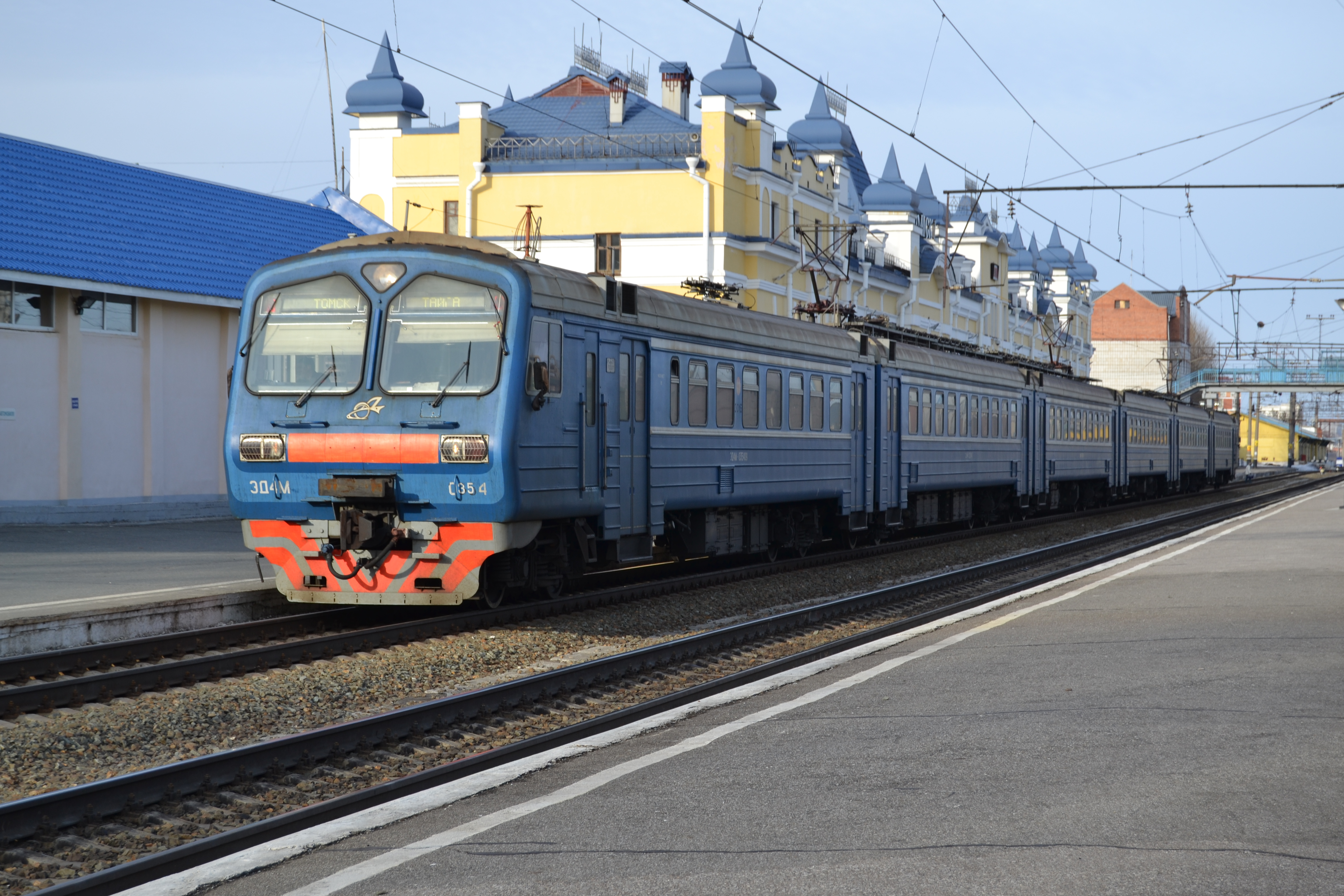 ЭД4М-0354 на станции Томск-1. Дневная электричка "Томск-2 - Тайга".